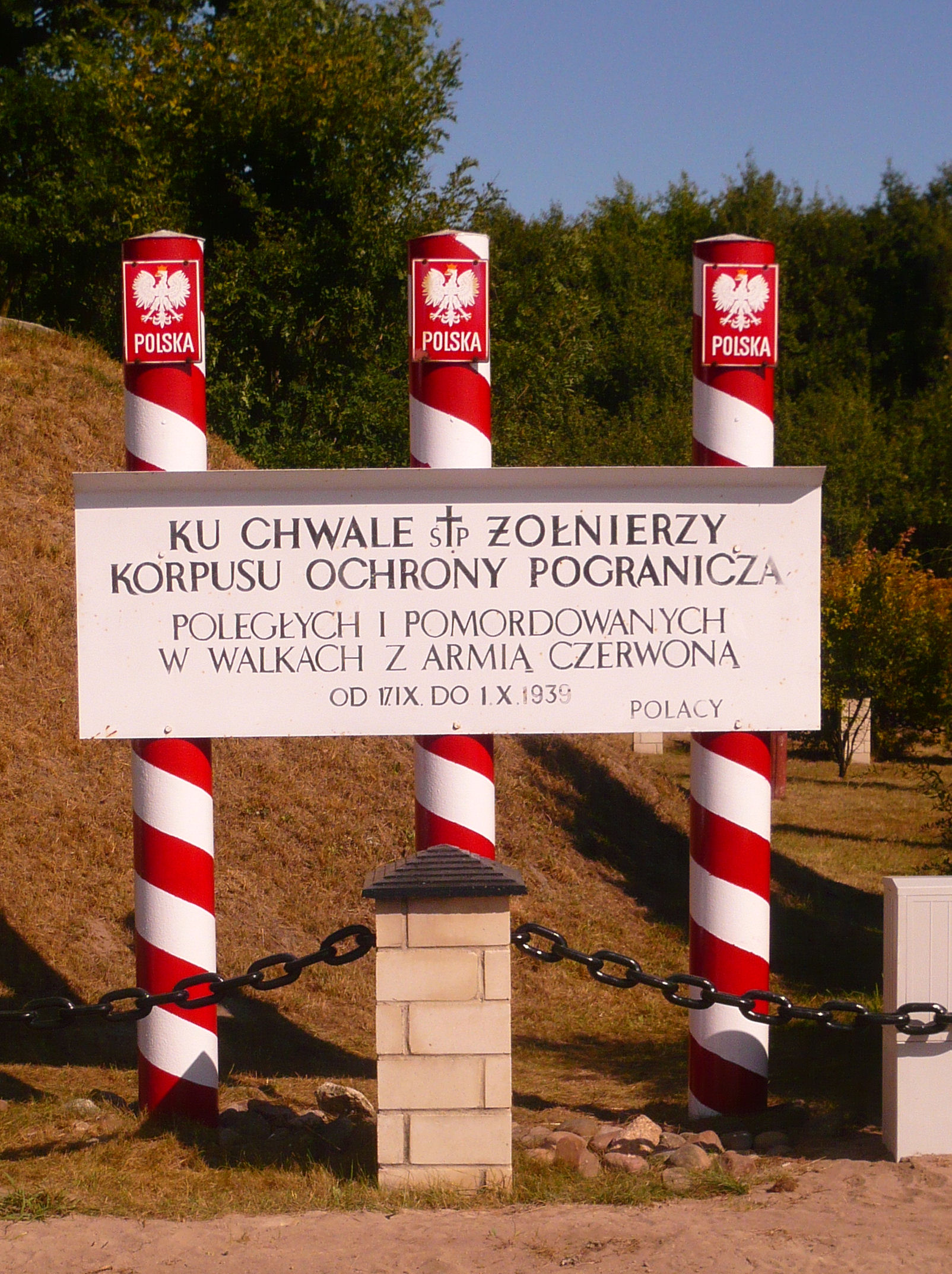 Wytyczno - cmentarz żołnierzy KOP poległych w walkach i z Armią Czerwoną oraz pomordowanych w niewoli przez żołnierzy Armii Czerwonej